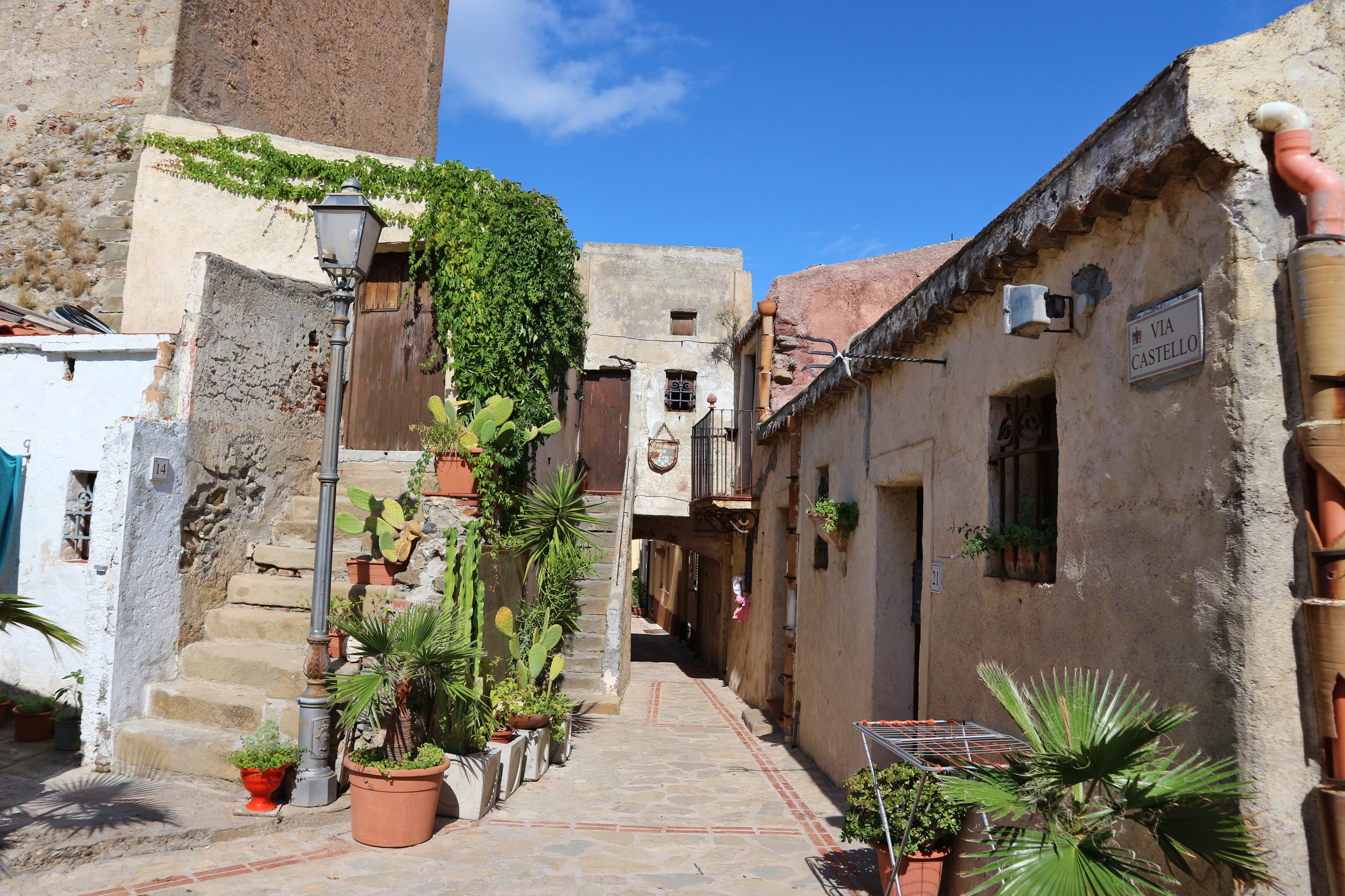 Piccolo borgo interno al castello di Brolo